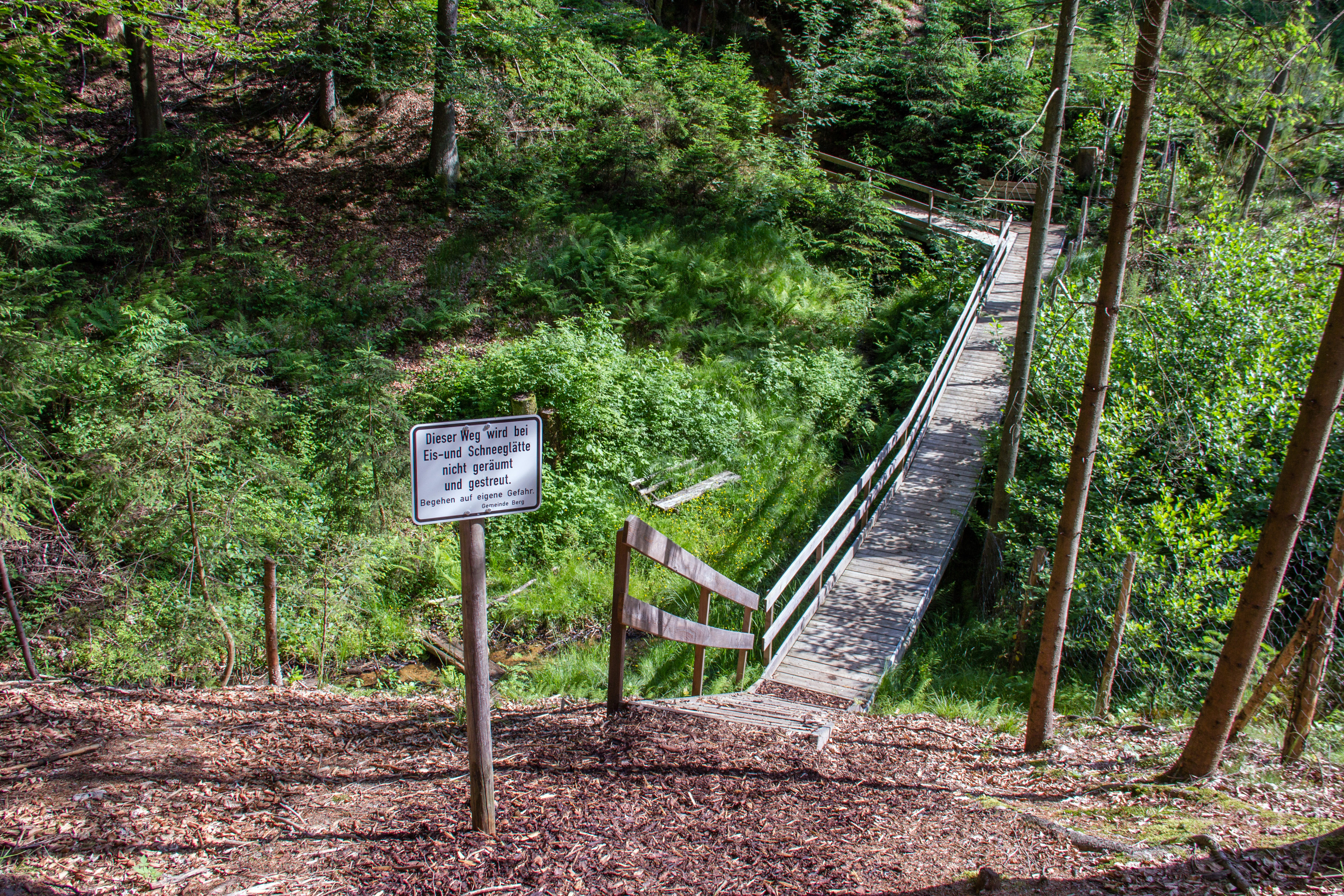 Kaltenbachquelle am Dillberg, Geotop